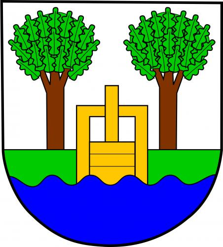 Tálín znak